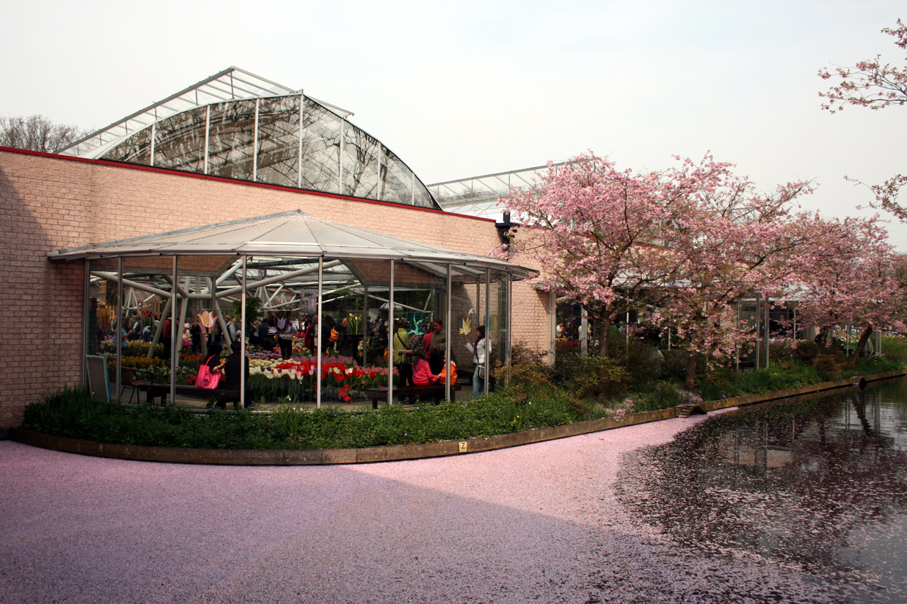 Parc floral de Keukenhof